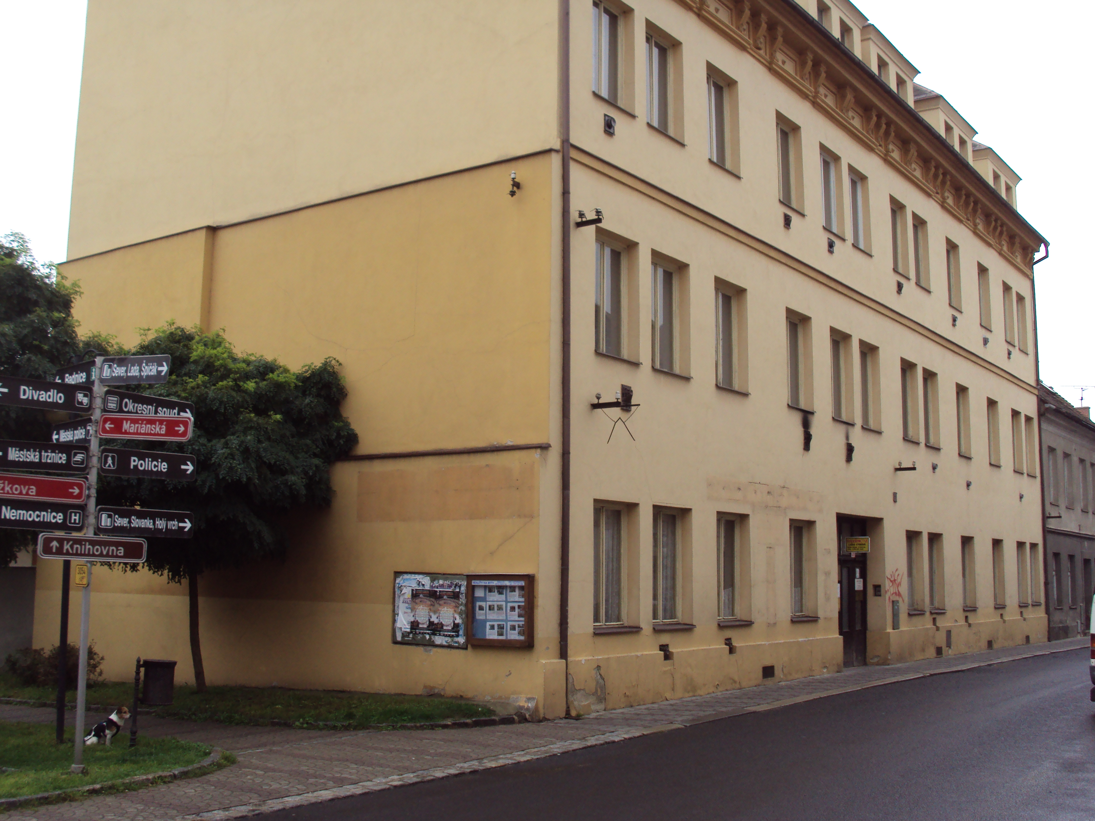 Dům v Žižkově ulici čp 231 nam náměstím TGM, sídlo mnoha českolipských spolků